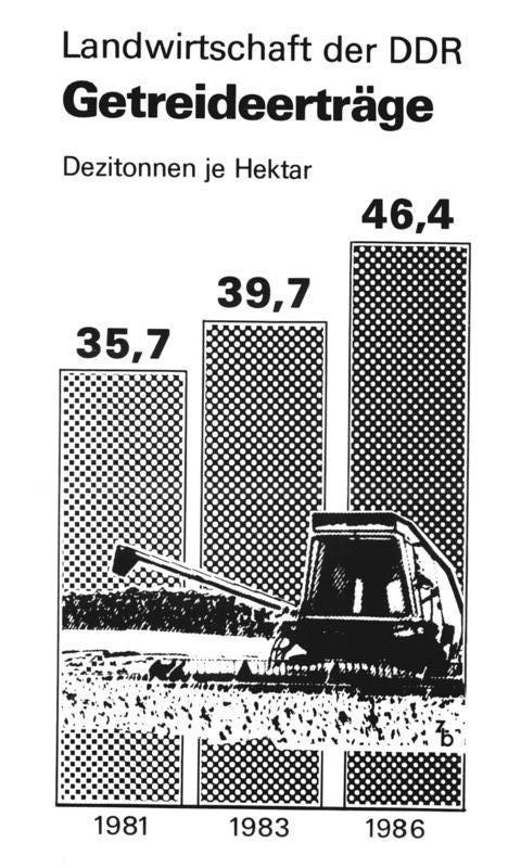 Infografik, Landwirtschaft der DDR Getreideerträge ADN-ZB Grafik 22.1.87-Bo-Landwirtschaft der DDR - Getreideerträge. Mit einem Hektarertrag von 46,4 Dezitonnen Getreide wurde von den Genossenschaftsbäuerinnen und -bauern, den Arbeiterinnen und Arbeitern in der sozialistischen Landwirtschaft der DDR im Jahr 1986 das Rekordergebnis des Vorjahres noch übertroffen. Insgesamt wurden 11,7 Millionen Tonnen Getreide geerntet.